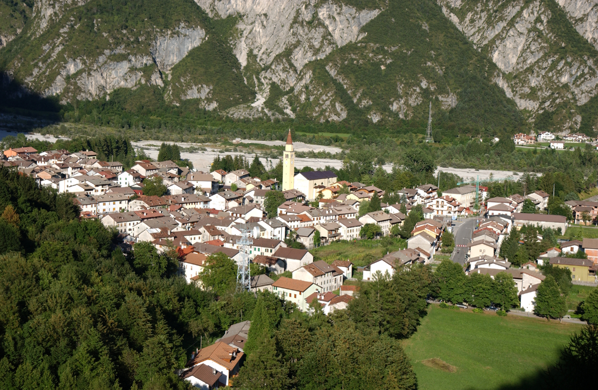 Vista Cimolais